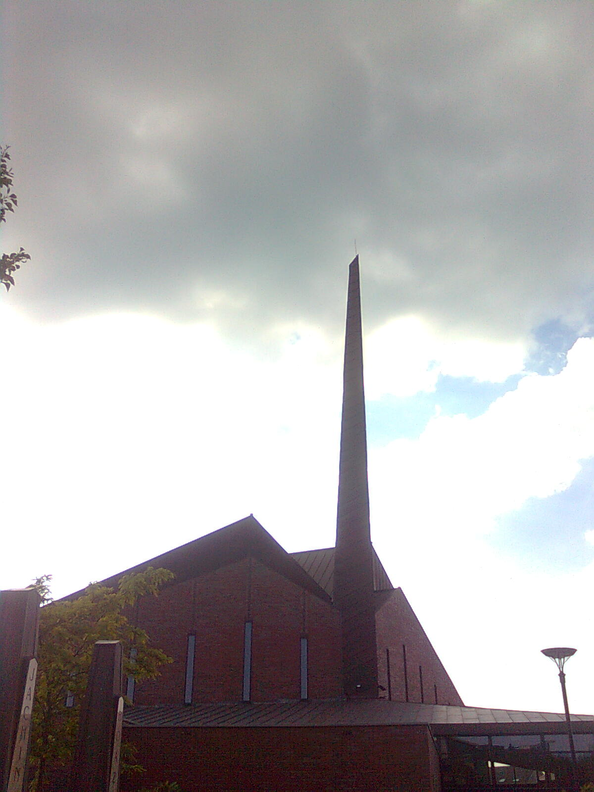 Buitenkant Jachin en Boazkerk Genemuiden